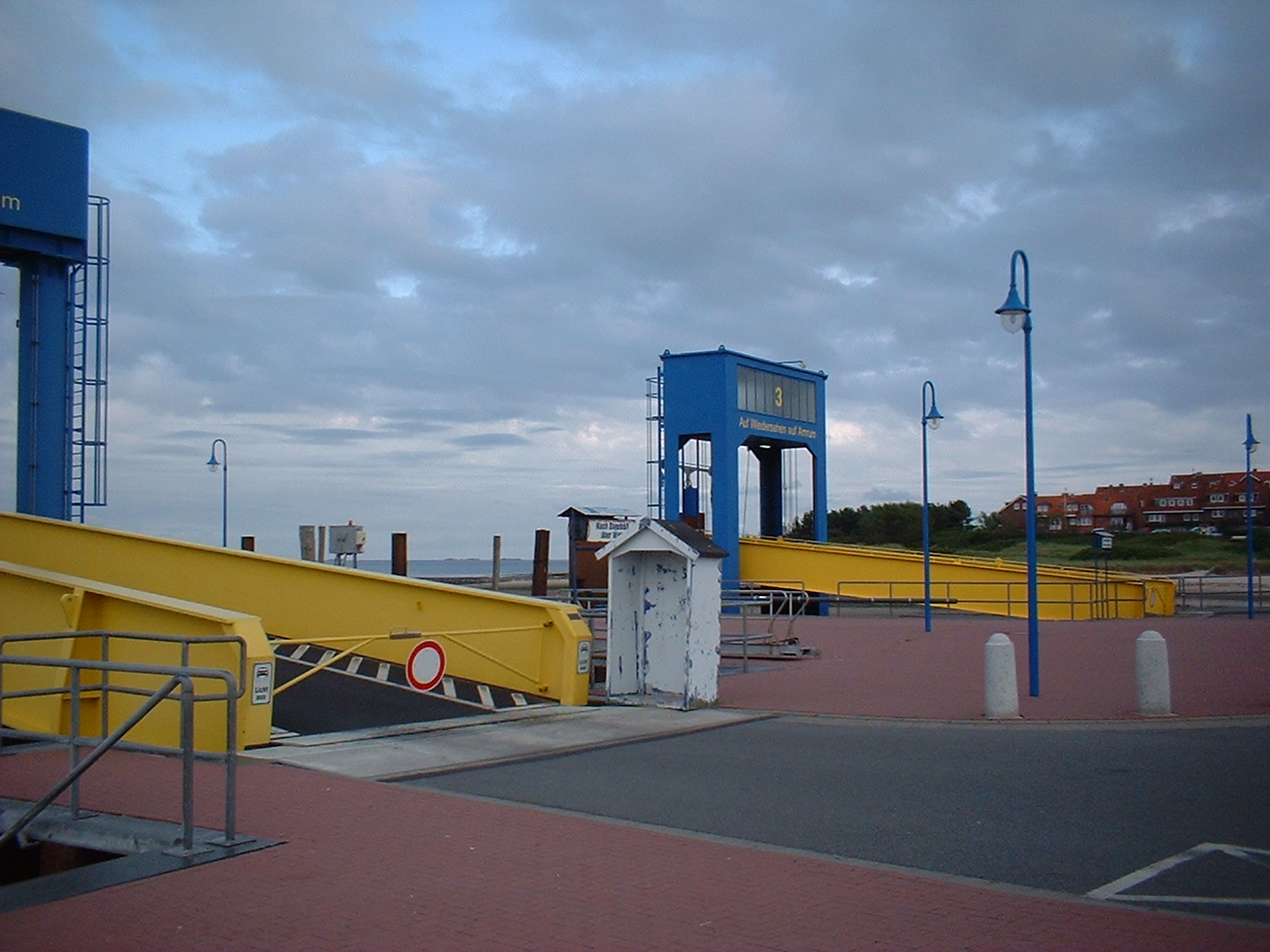 Fähranleger Wittdün, Amrum